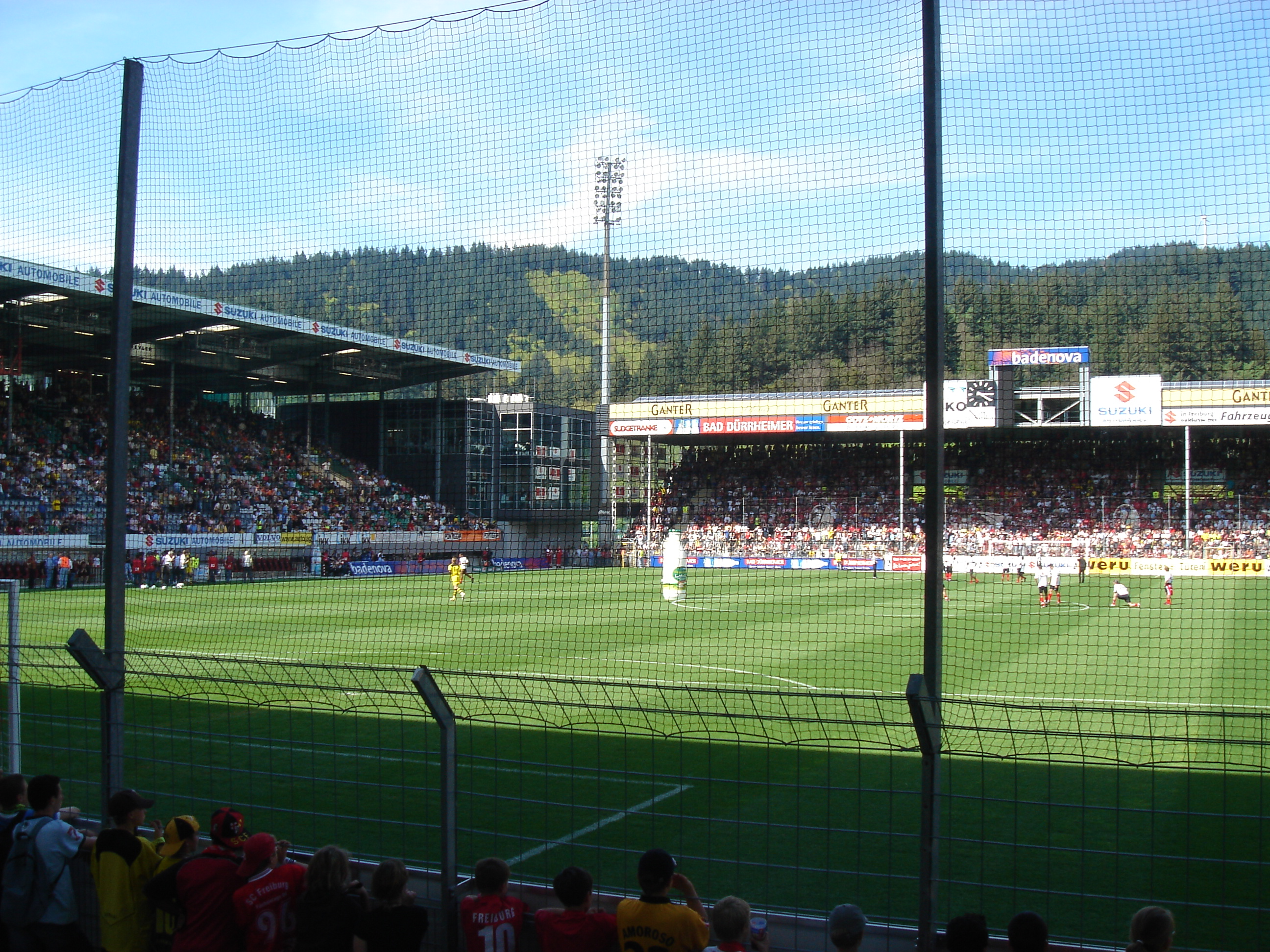 Badenova-Stadion des SC Freiburg gegen Borussia Dortmund. Mit 25.000 Zuschauern ausverkauftes Stadion